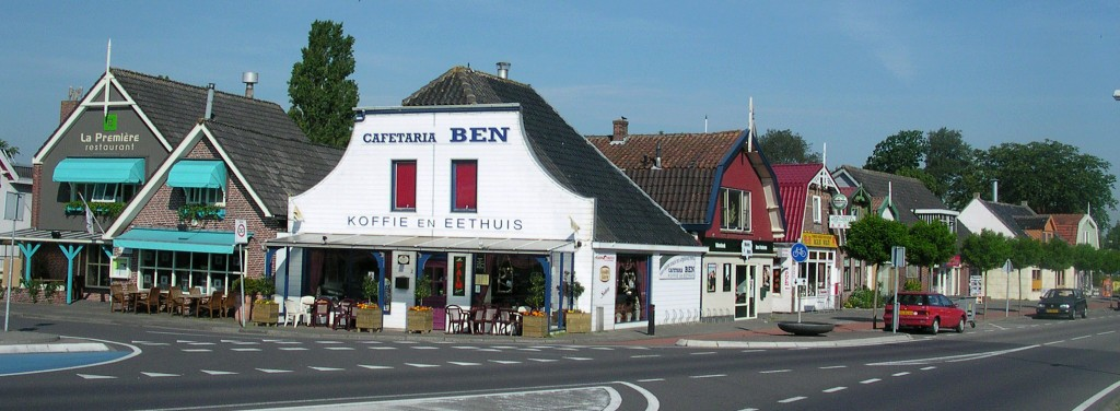 Uitgaanscentrum van Anna Paulowna, in wat eigenlijk Kleine Sluis is/was. Center of Anna Paulowna, in what is original Kleine Sluis.